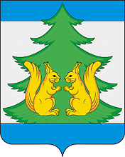 Герб Ленского муниципального района (Архангельская область)